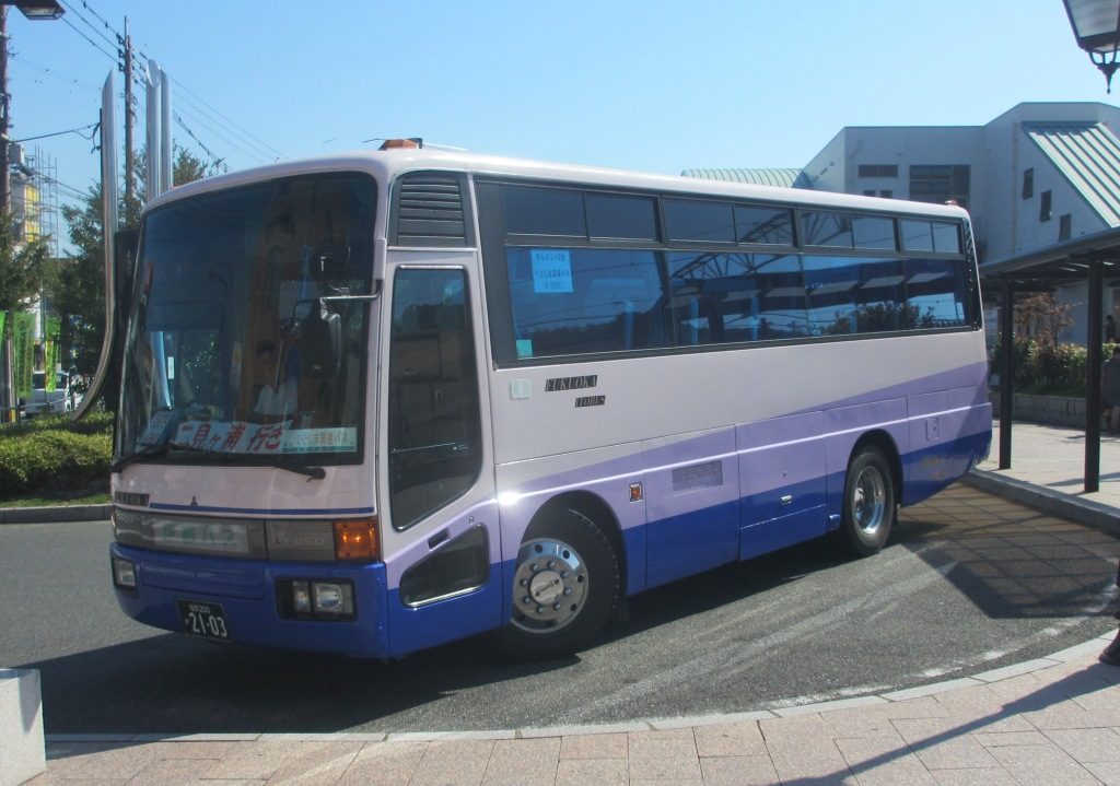 いとしま周遊バス（福岡伊都バス）